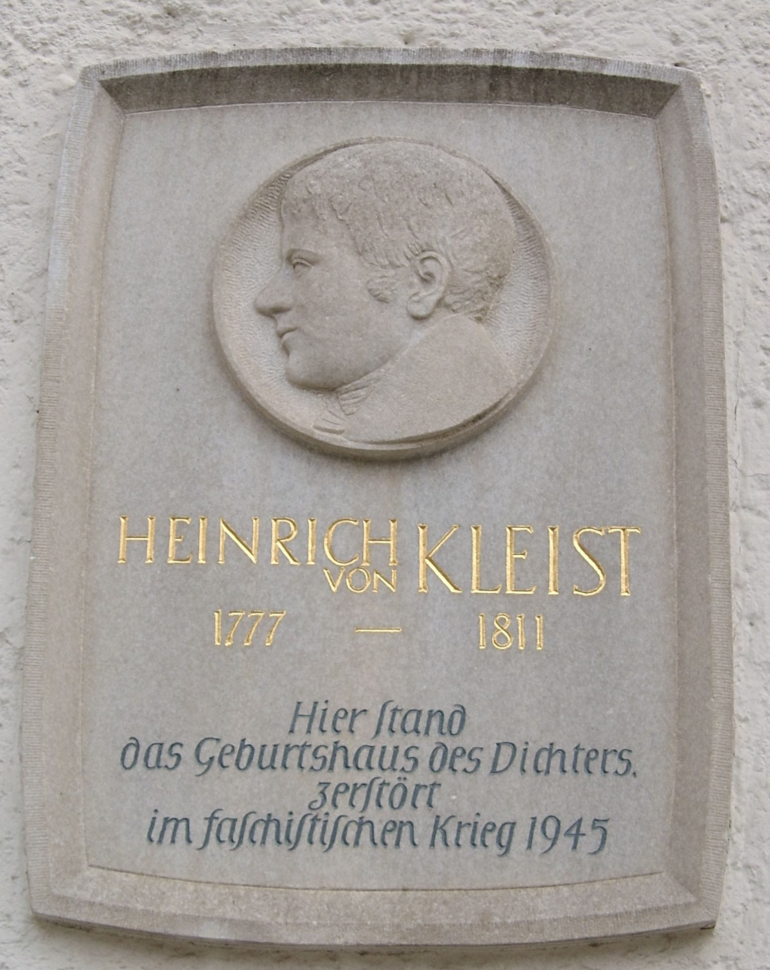 Gedenktafel am Geburtshaus von Heinrich von Kleist in Frankfurt (Oder).